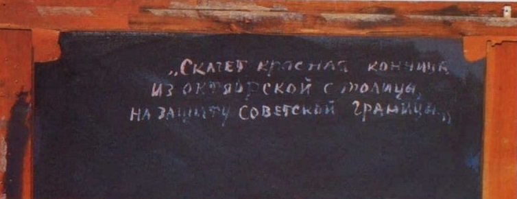 Фрагмент оборота картины "Красная конница". 1928-1932